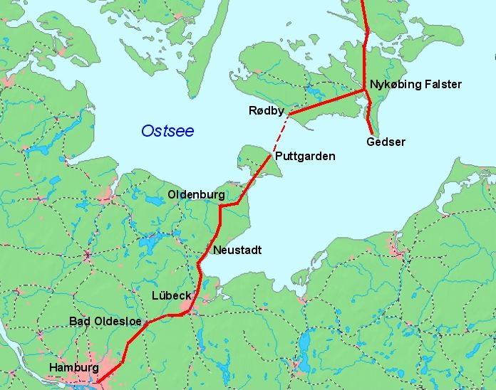 Karte der Vogelfluglinie